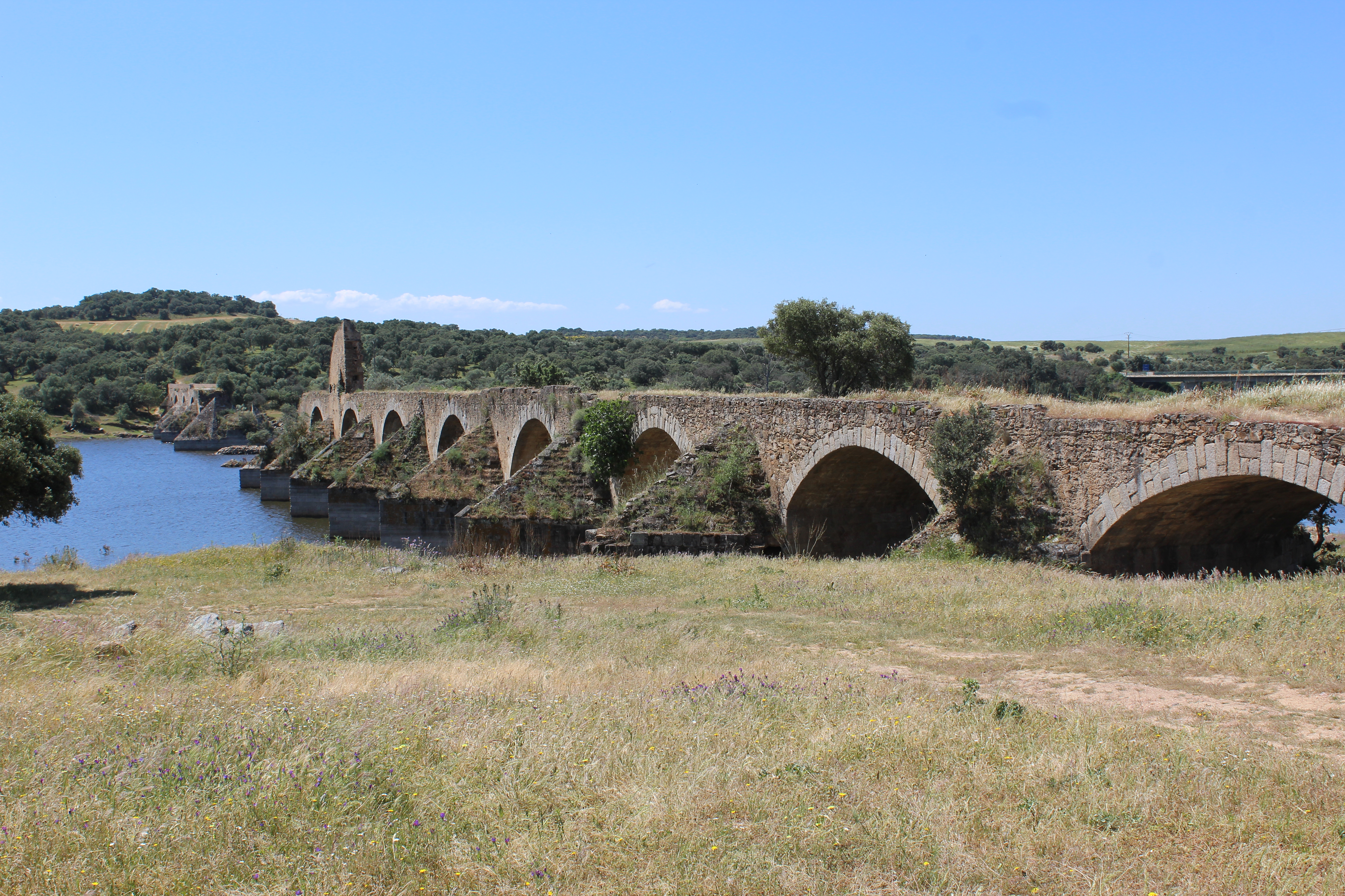 Río Guadiana Internacional al fondo. This is a photography of a Special Area of Conservation in Spain with the ID: ES4310027. Natura2000 entry, EEA entry